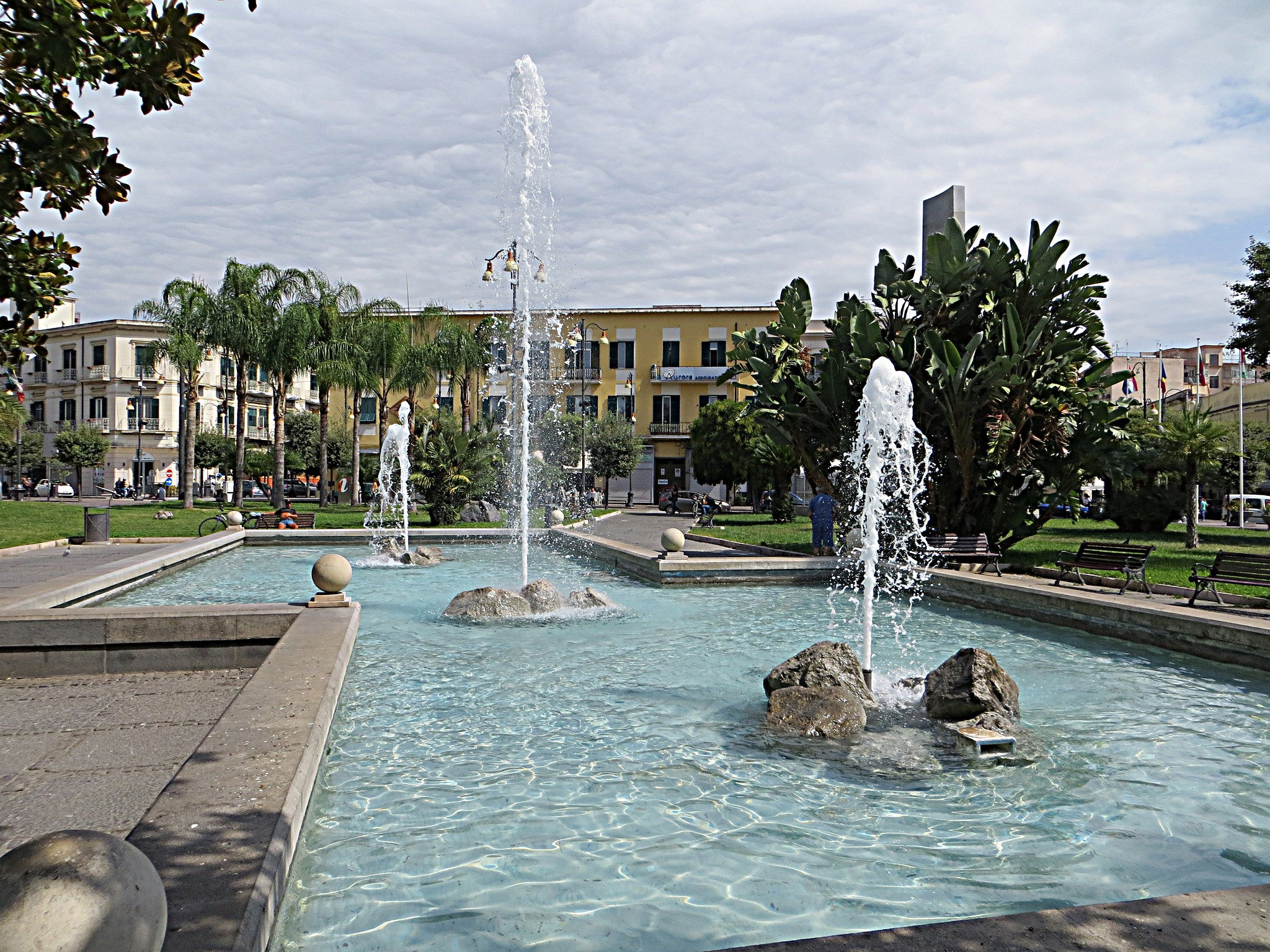 Piazza Bartolo Longo